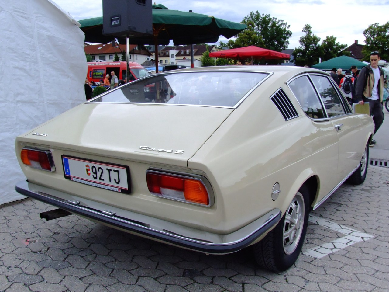 Quelle: selbst fotografiert, 07/2007 Fotograf: Späth Chr.